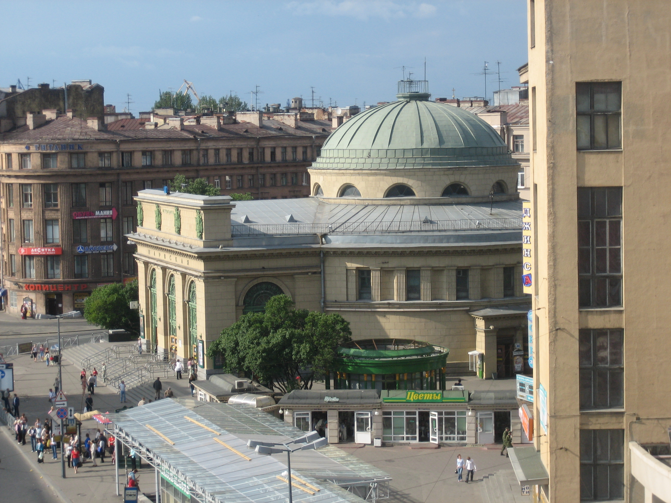 Станция метро Нарвская (Санкт-Петербург), вид сверху сбоку.